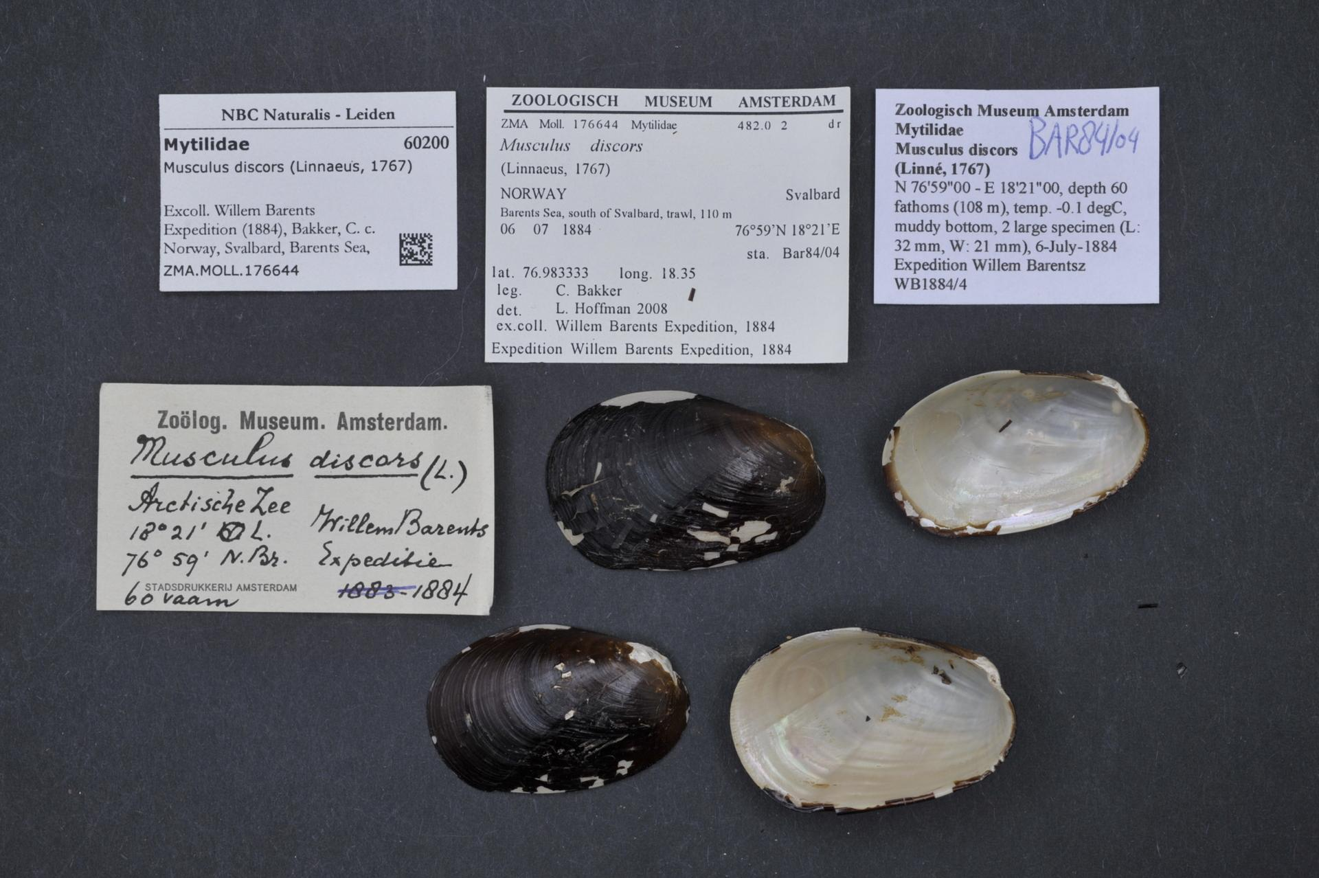 Musculus discors (Linnaeus, 1767)